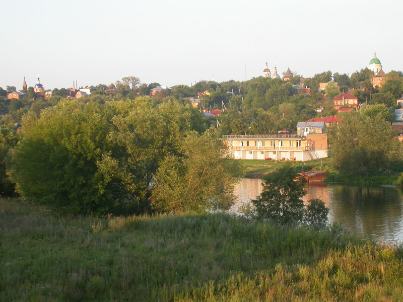 Zaraisk, Moscow Oblast (Russia), Summer, 2005